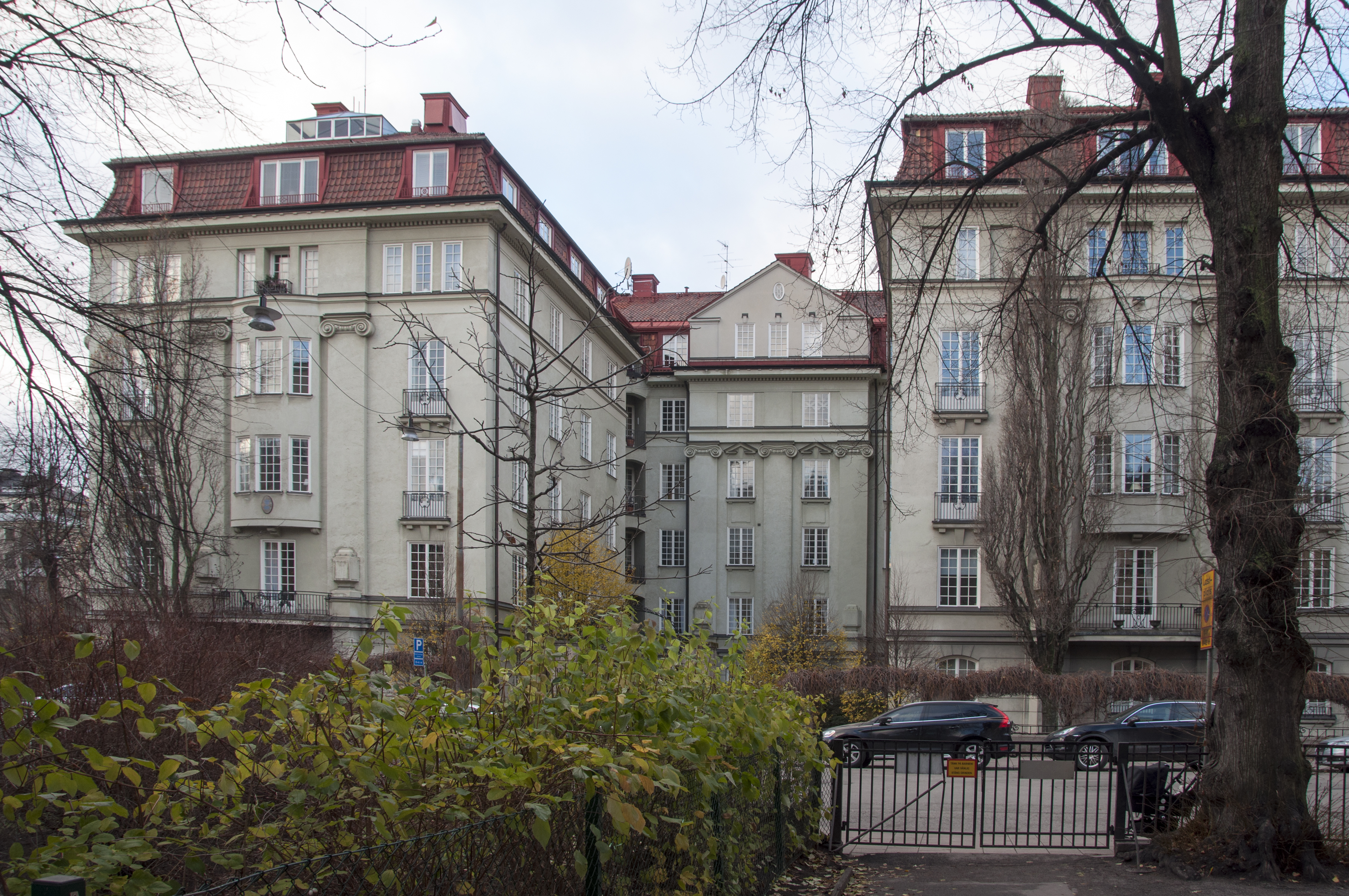 Villagatan 13, Byggnadsår 1915-17, arkitekt Edvard Bernhard